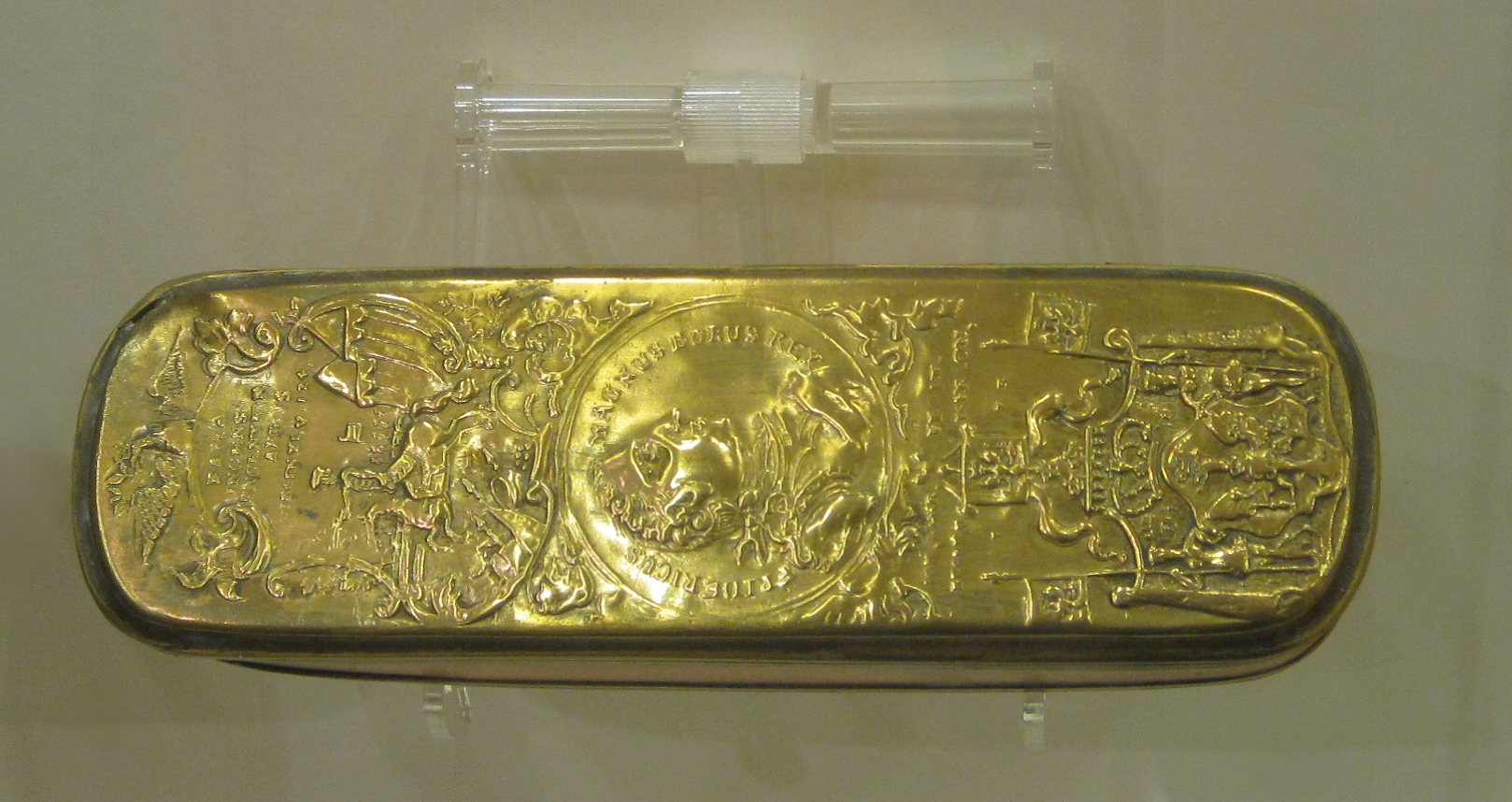 Geprägte Iserlohner Tabakdose mit Inschrift auf den Ruhm Friedrichs II. Ausstellungsstück im Stadtmuseum Iserlohn.